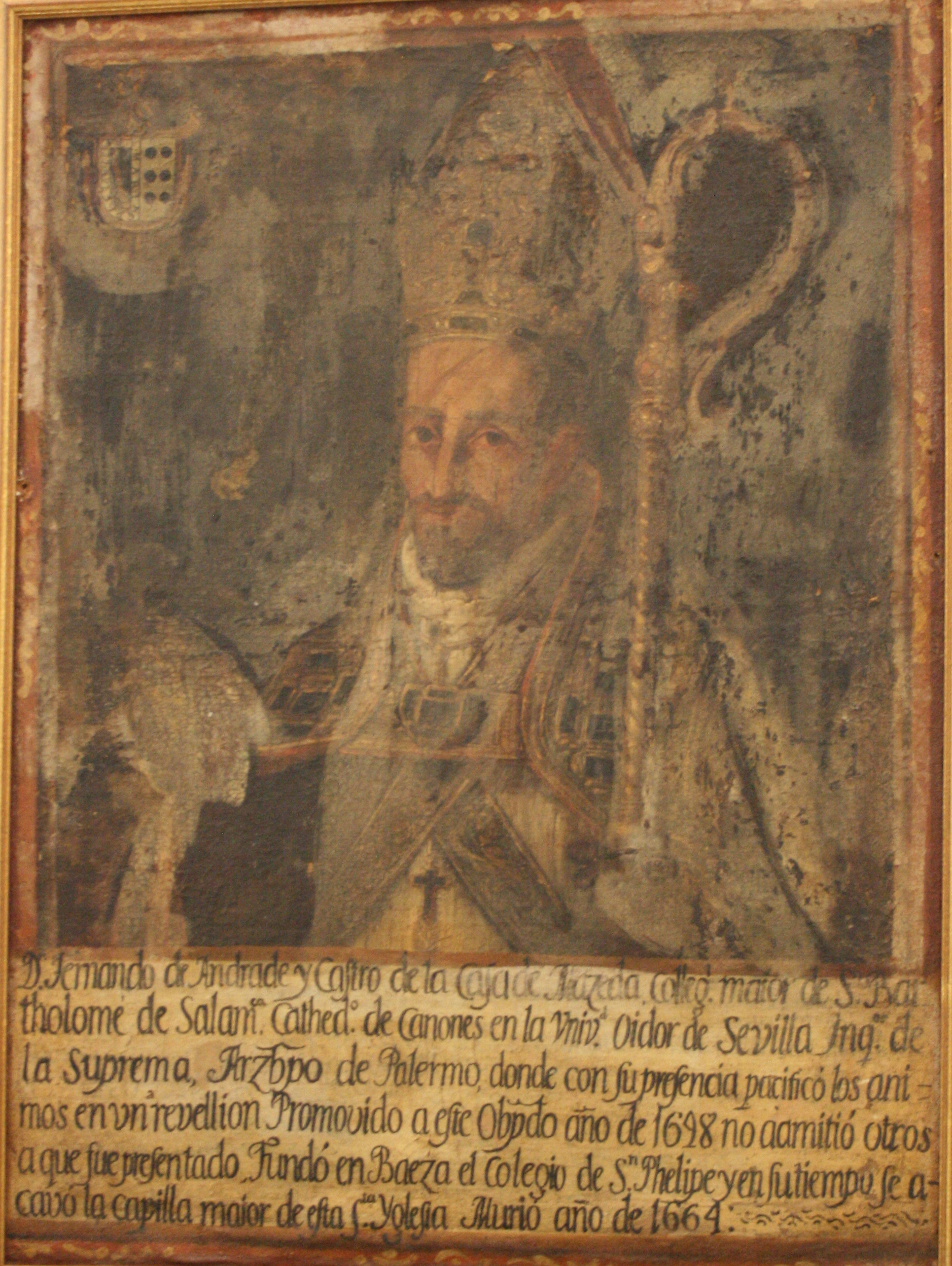 Fernando de Andrade y Castro, Obispo de Jaén (1648-1664)